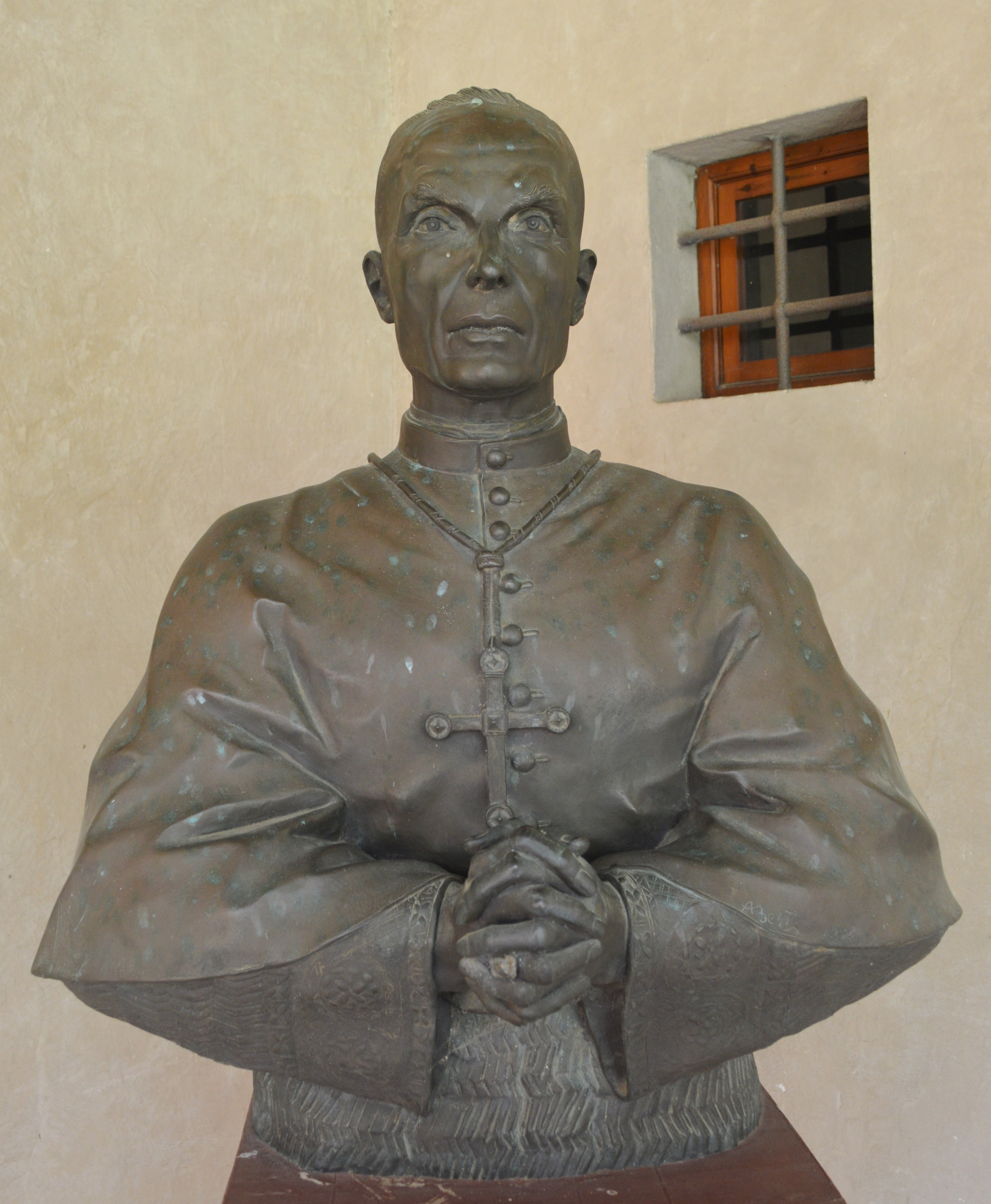 Busto raffigurante il cardinale Elia Dalla Costa, nel chiostro dell'Eremo di Lecceto a Malmantile.